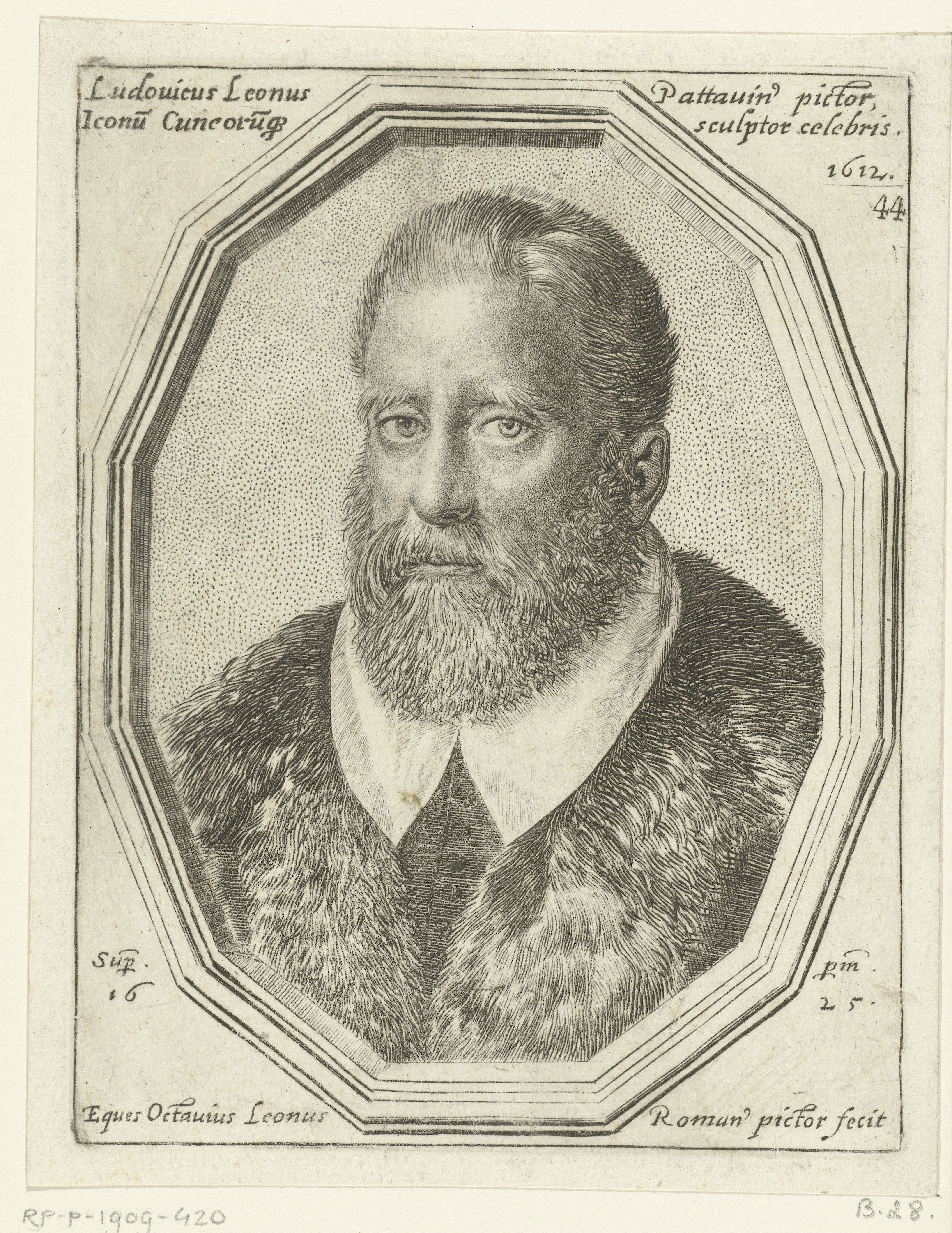 IdentificatieTitel(s): Portret van Ludovico LeoniLudovicus Leonus Pattavinus pictor Inconu Cuncorusque sculptor celebris 1612 (titel op object)Objecttype: prent Objectnummer: RP-P-1909-420Catalogusreferentie: The Illustrated Bartsch 28Opmerking: tweede staatOpschriften / Merken: verzamelaarsmerk, verso midden, gestempeld: Lugt 2228Omschrijving: Portret van de kunstenaar Ludovico Leoni, vader van de Vervaardiger: van de prent.VervaardigingVervaardigerprentmaker: Ottavio Mario Leoni (vermeld op object)naar eigen ontwerp van: Ottavio Mario LeoniPlaats vervaardiging: ItaliëDatering: 1625Fysieke kenmerken: ets en stippeletsMateriaal: papier Techniek: etsenAfmetingen: plaatrand: h 143 mm × b 111 mmOnderwerpWat: portrait, self-portrait of artistWie: Ludovico LeoniVerwerving en rechtenVerwerving: aankoop 1909Copyright: Publiek domein